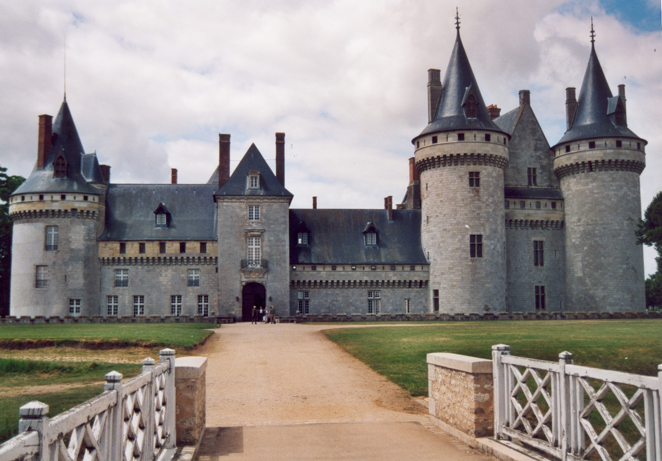 France Loiret Sully-sur-Loire Le château Photographie prise par GIRAUD Patrick